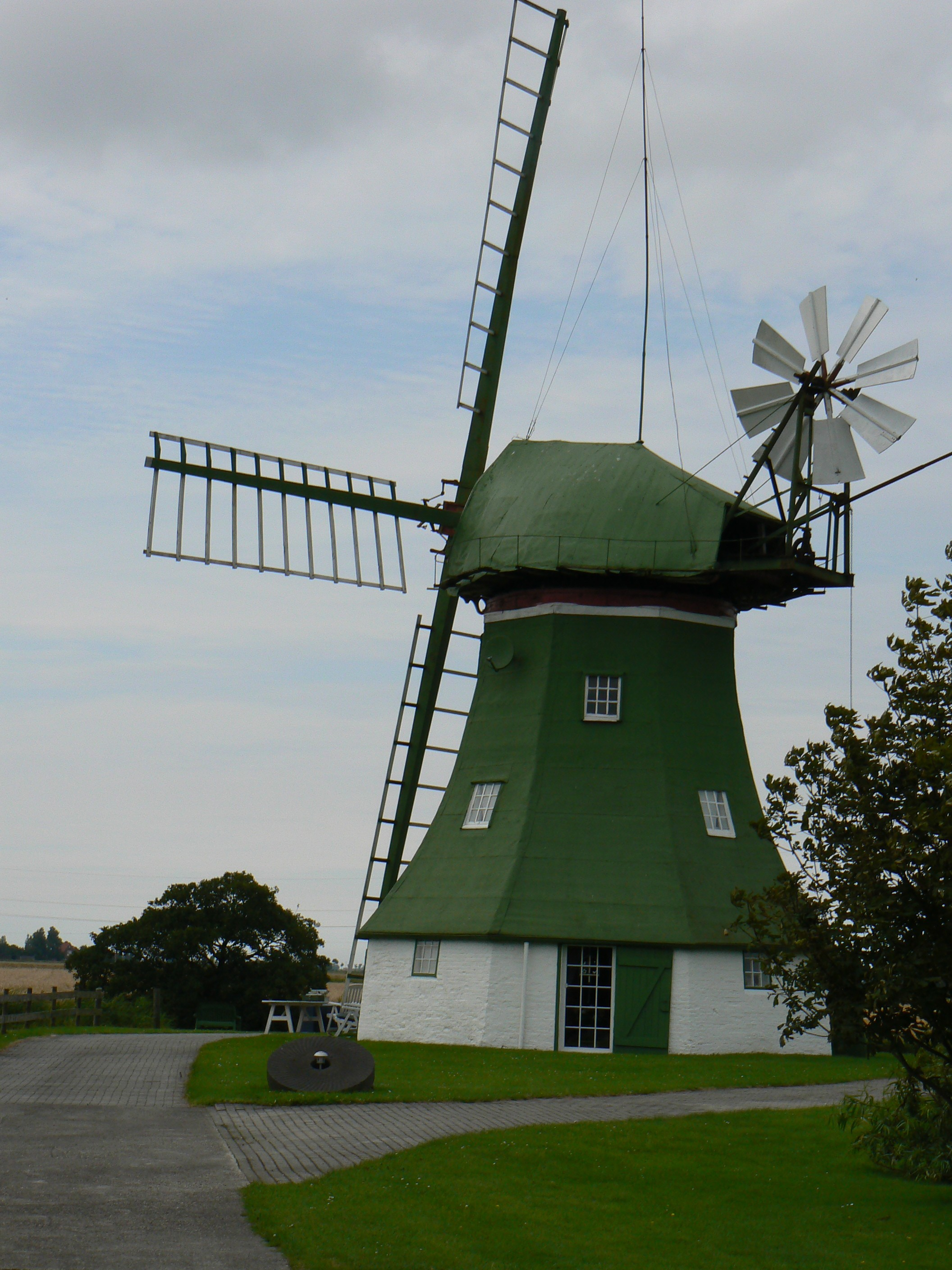 Altfunnixsiel Erdholländer /Germany